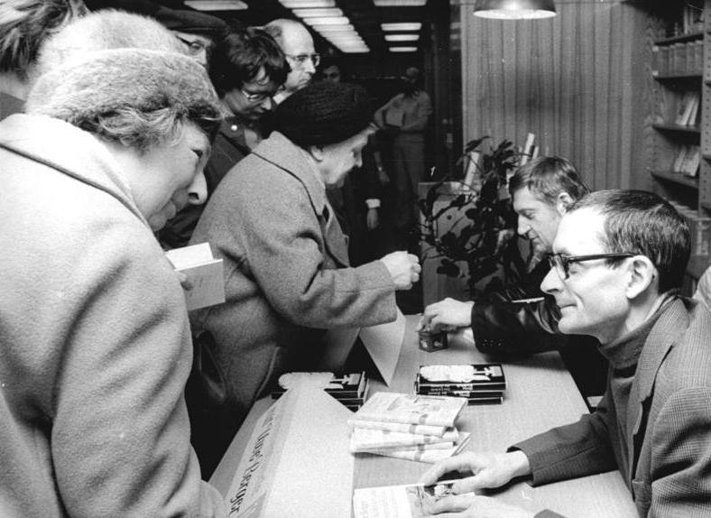 ADN-ZB-Mittelstädt-13.11.75-Bu-Berlin: Autogrammstunde in der Buchhandlung "Das Internationale Buch"- Der Schriftsteller Uwe Berger (rechts) signierte seine Bücher "Backsteintor und Spreewaldkahn" sowie "Lächeln im Flug" und der Schriftsteller Heinz Knobloch (2.v.r.) sein Buch "Das Lächeln der Zeitung"."